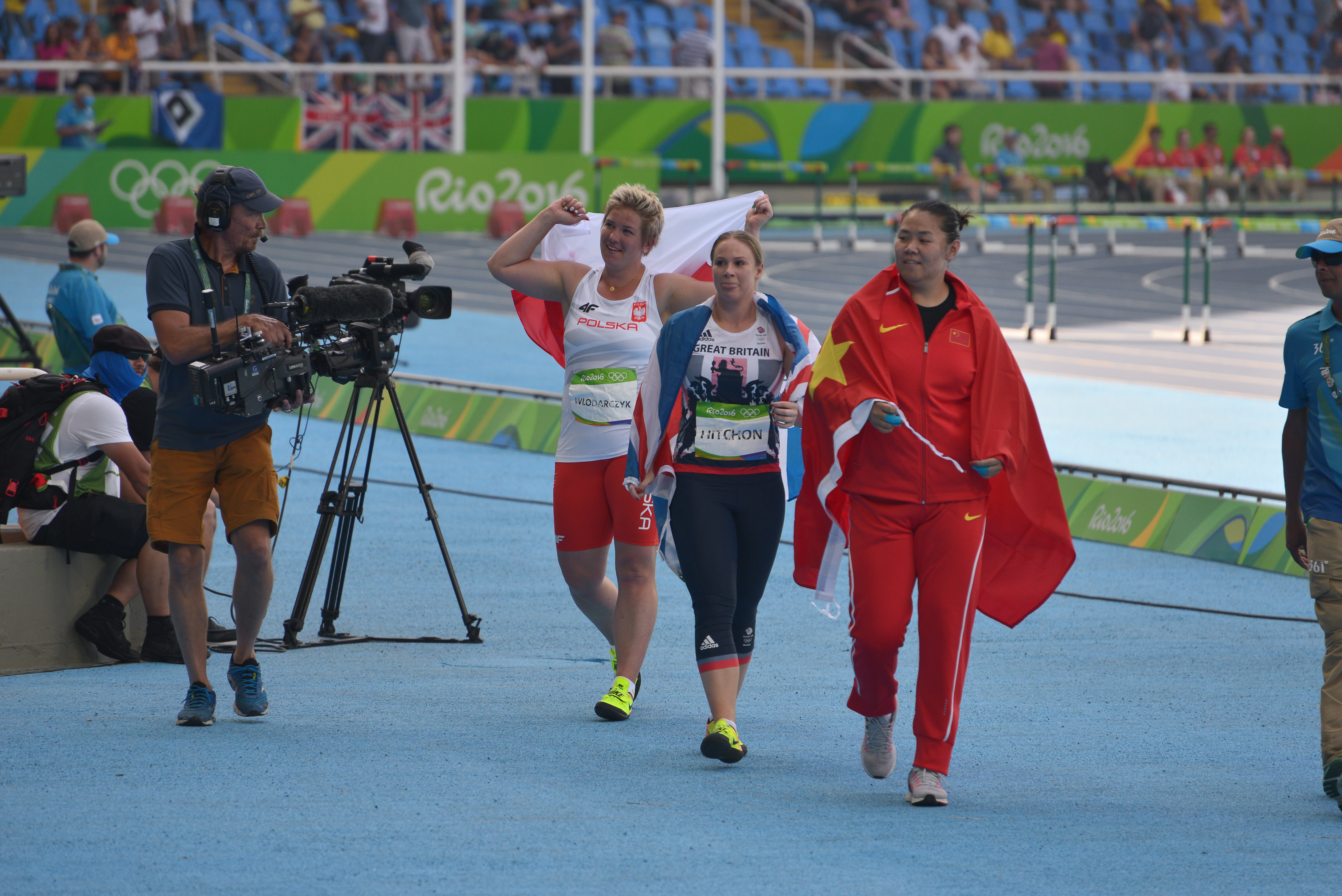 Défilé des gagnantes du concours du marteau aux JO de Rio 2016